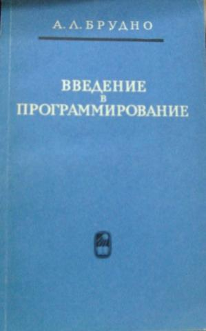 Обложка книги А. Брудно